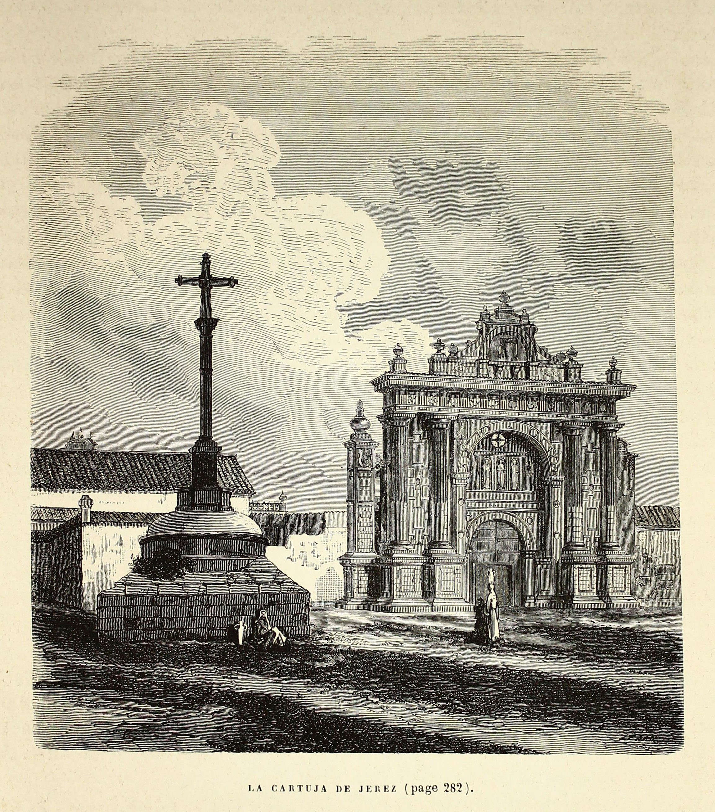 Autor: Davillier, Jean Charles, barón, 1823-1883 Descripción bibliográfica: L'Espagne / par Le Baron CH. Davillier ; ilustrée de 309 gravures dessinées su bois par Gustave Doré. - Paris : Librairie Hachette, 1874. - 799 p. : il. Materia: España- Geografía Materia: España- Usos y costumbres Ilustrador: Doré, Gustave, 1832-1883 Editor: Libreria Hachette Lugar de impresión: Francia, París Localización: Libro completo